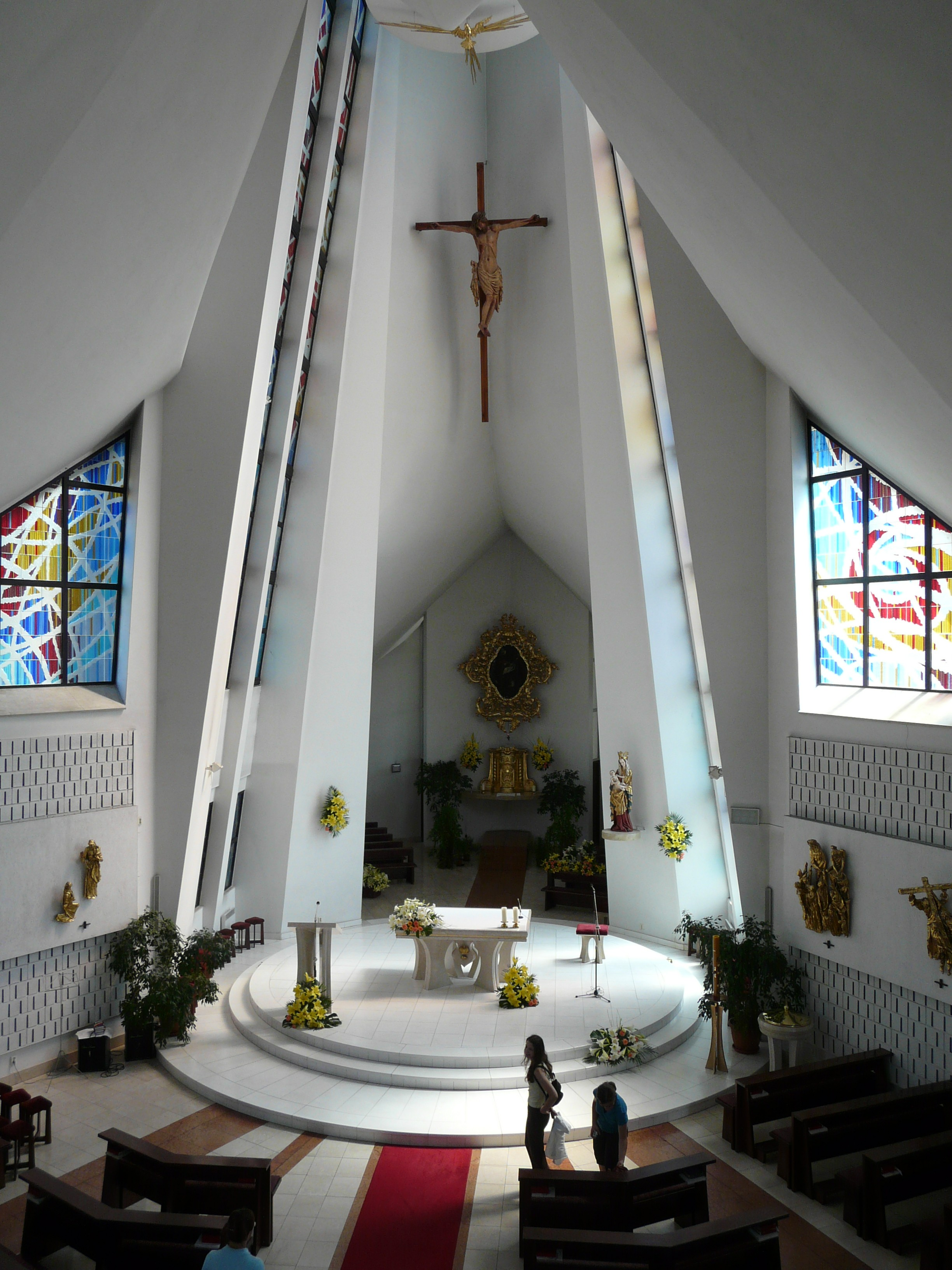 Pohled na interiér kostela sv. Václava v Břeclavi.